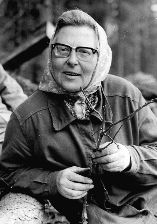 ADN-ZB Pätzold-6.4.1982 Bez. Schwerin-Frühjahrsaufforstung. Carla Biermann ist Brigadierin im Staatlichen Forstwirtschaftsbetrieb Güstrow. Die 46jährige Genossin ist seit 30 Jahren in einer Aufforstungsbrigade tätig. In den Güstsrower Forstrevieren werden in diesem Jahr 381 Hektar neu bepflanzt. - siehe auch 1982-0406-9N